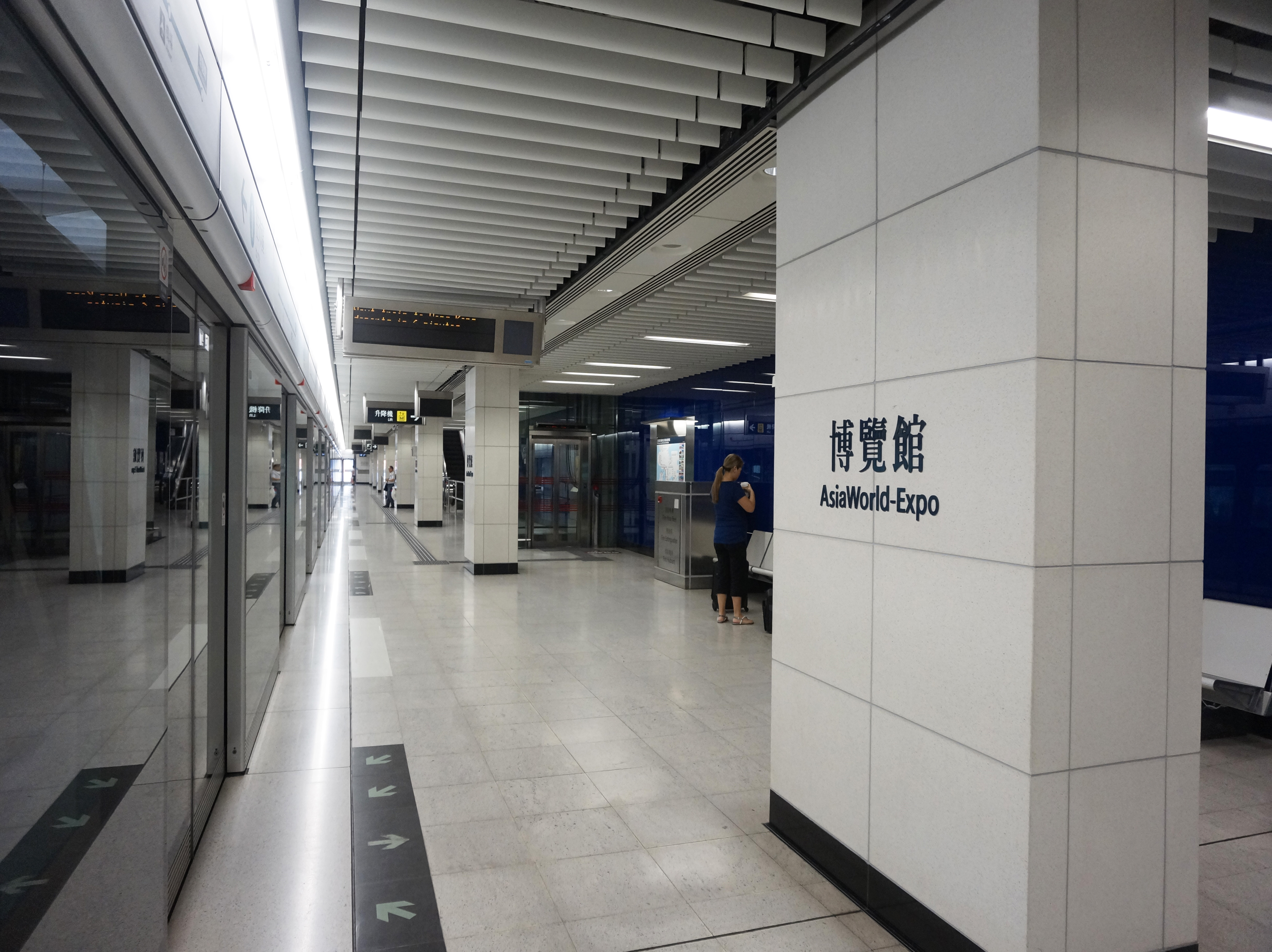 港鐵博覽館站月台